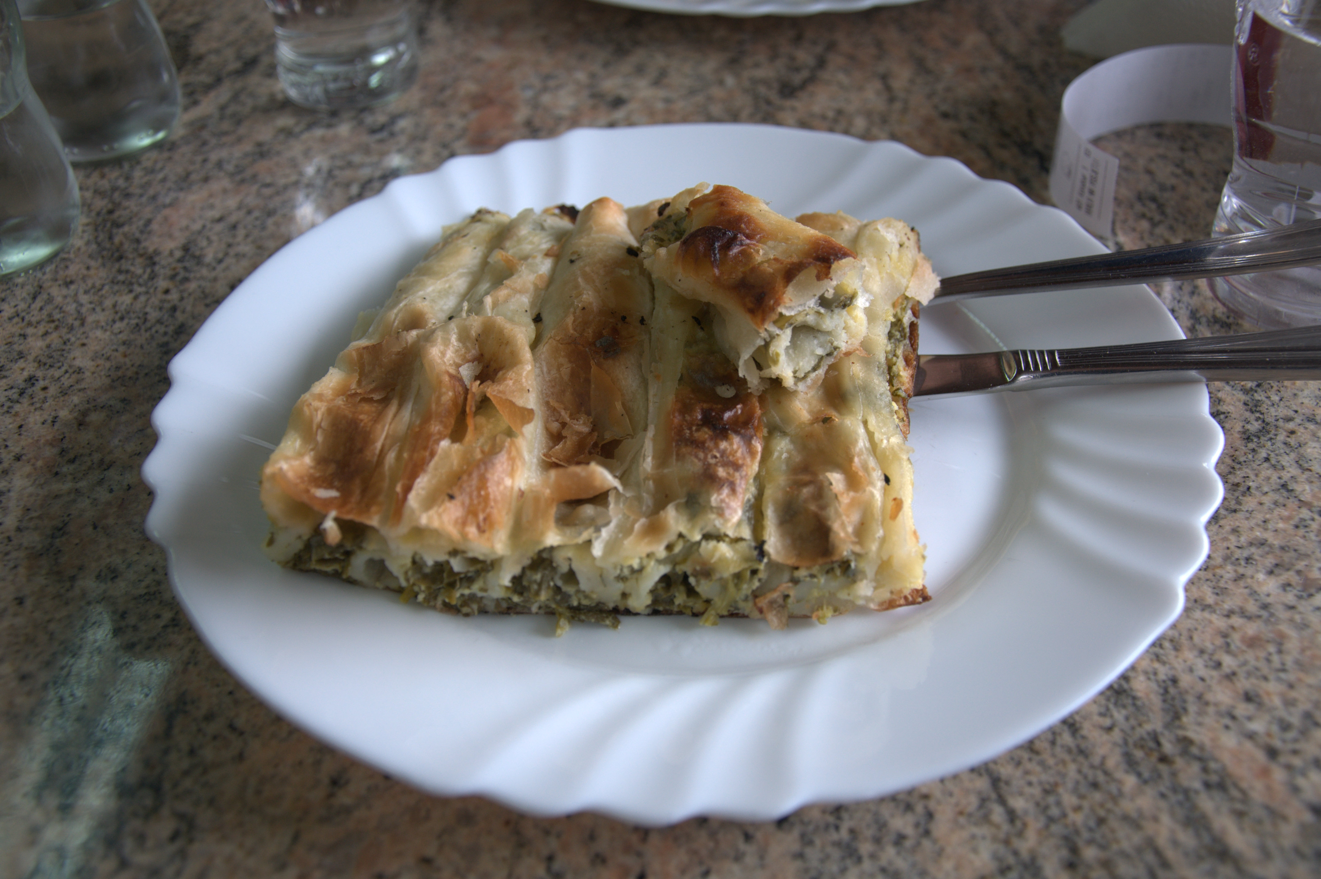 Zeljanica